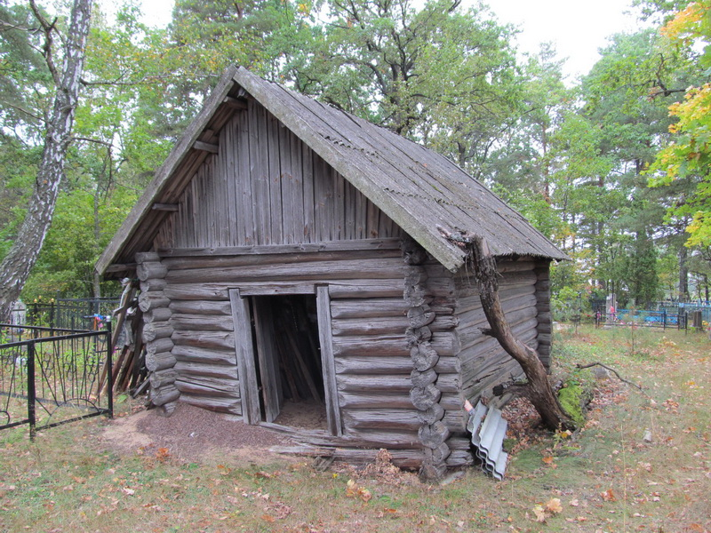 Макарычы. Капліца на могілках